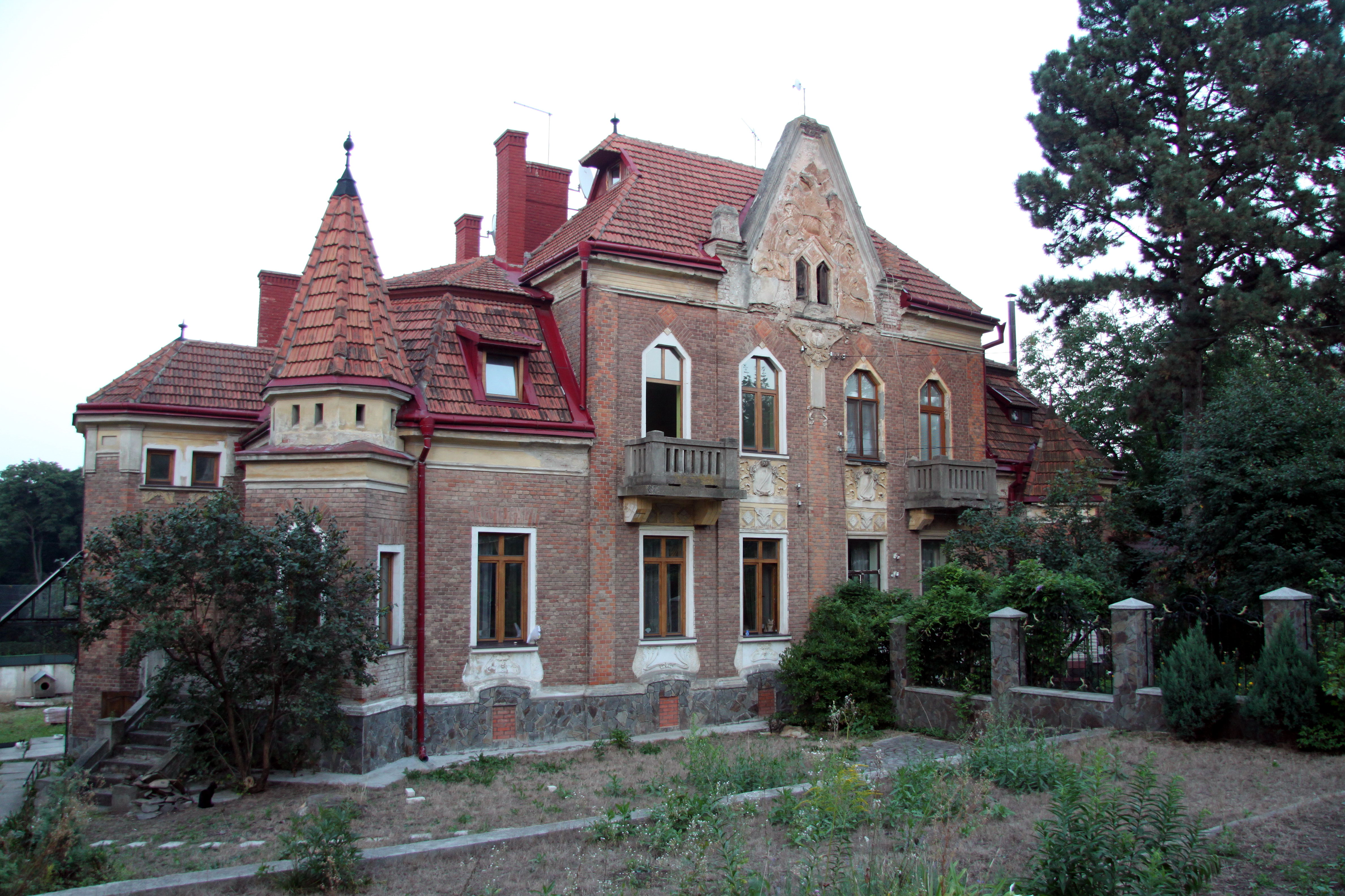 Житловий будинок, Федьковича Юрія, 27 А, Чернівці